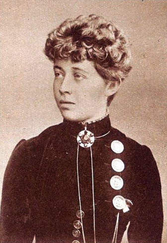 Ricarda Huch (1864–1947) Schriftstellerin, Dichterin, Philosophin, Historikerin